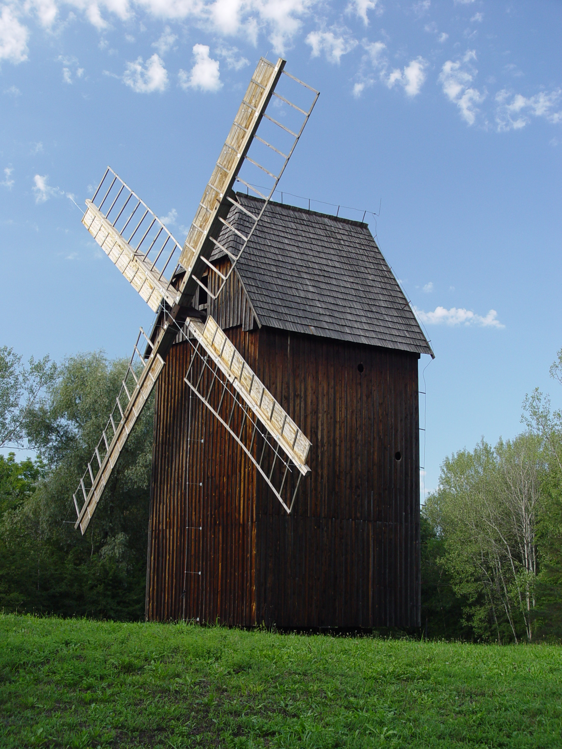 Wiatrak w Muzeum Wsi Opolskiej w Opolu